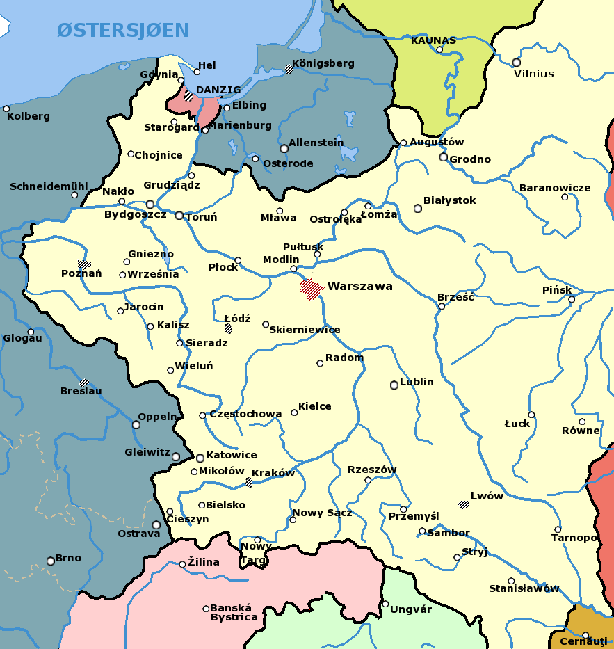 Polen i mellomkrigstiden